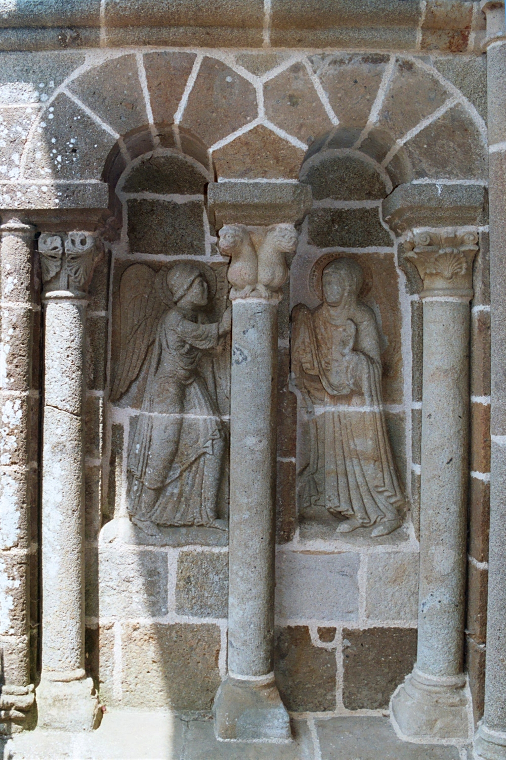 France - Auvergne - Cantal - Église Saint-Georges d'Ydes-Bourg